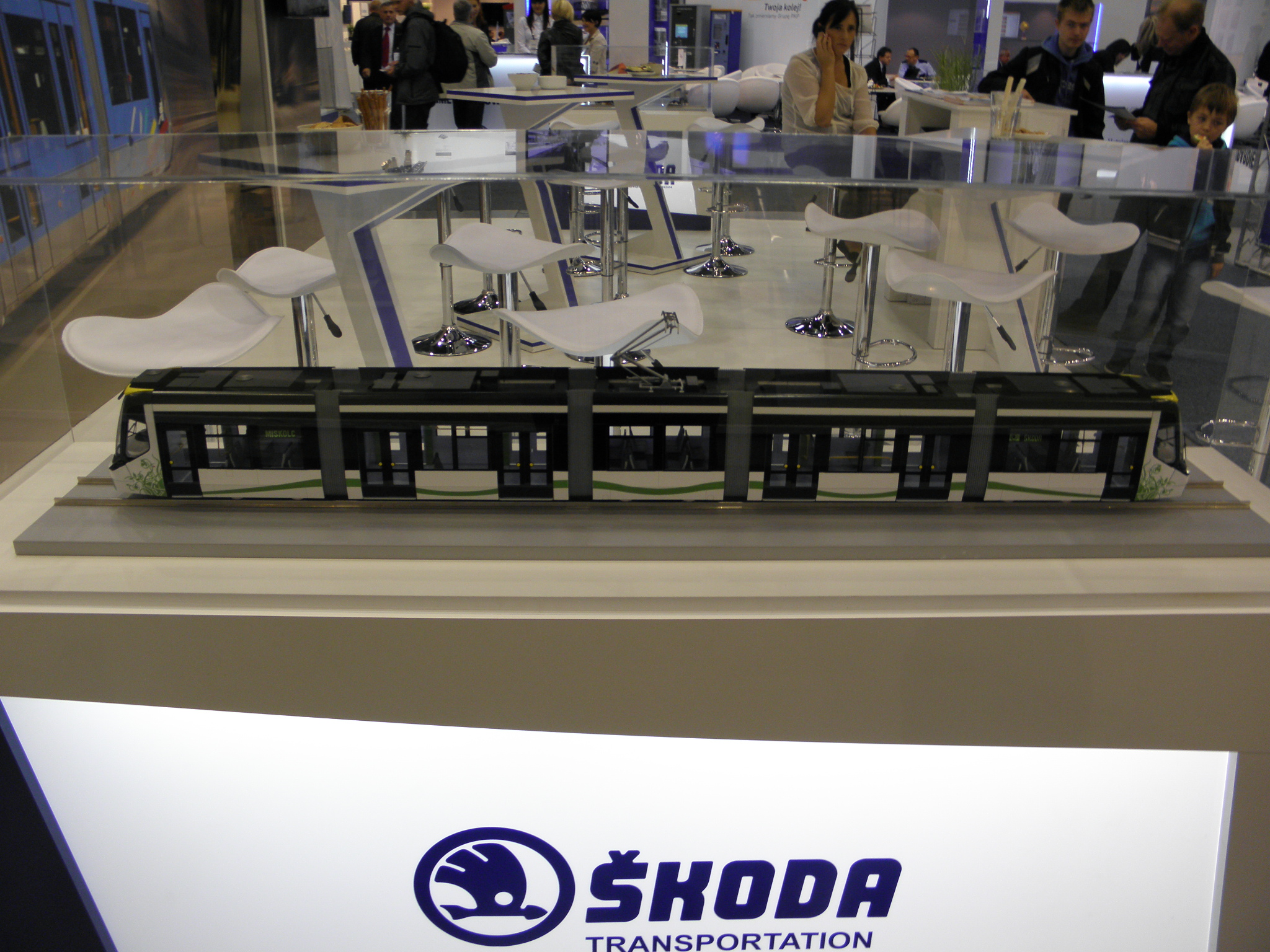 Photo from Trako 2013, Gdańsk/Danzig